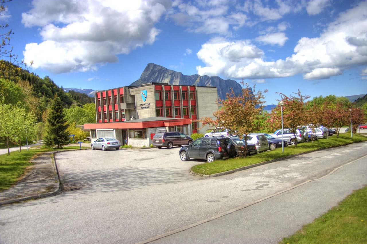 Hyllestad kommunehus